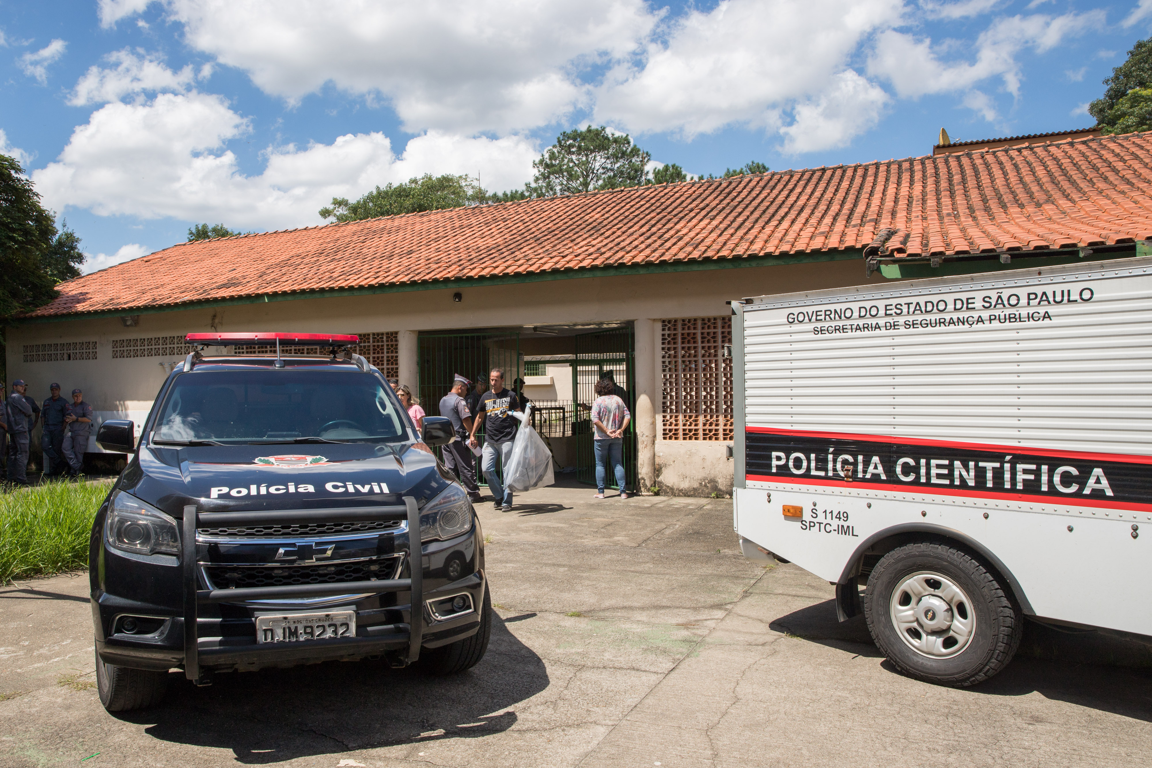 Secretários da Segurança Pública, participam de coletiva de imprensa na Escola Raul Brasil.